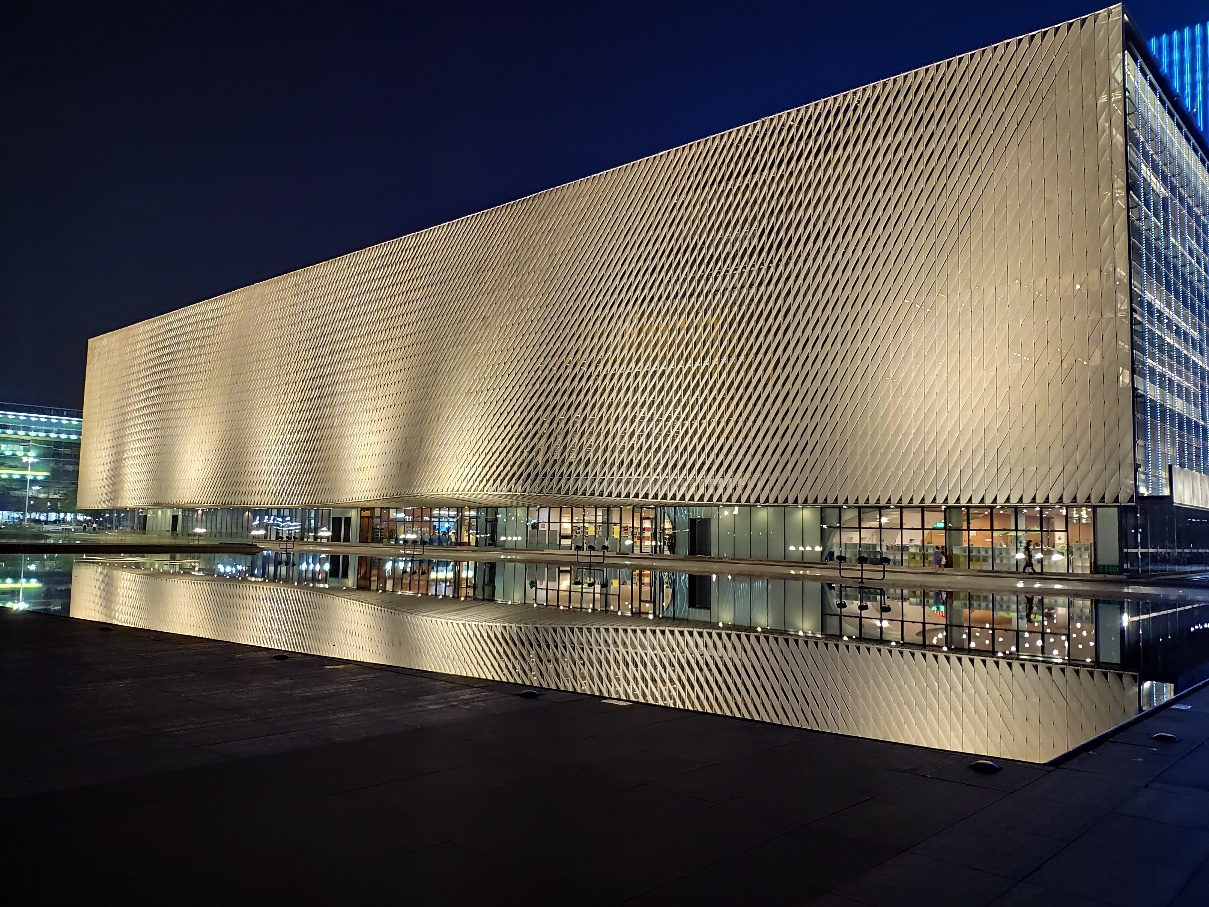 宝安图书馆新馆的侧面照片，于夜间拍摄。可以看到建筑外的双层幕墙和铝合金网状穿孔板的“肌理”、光影变化以及广场东侧的大面积水池造成的“悬浮”效果。